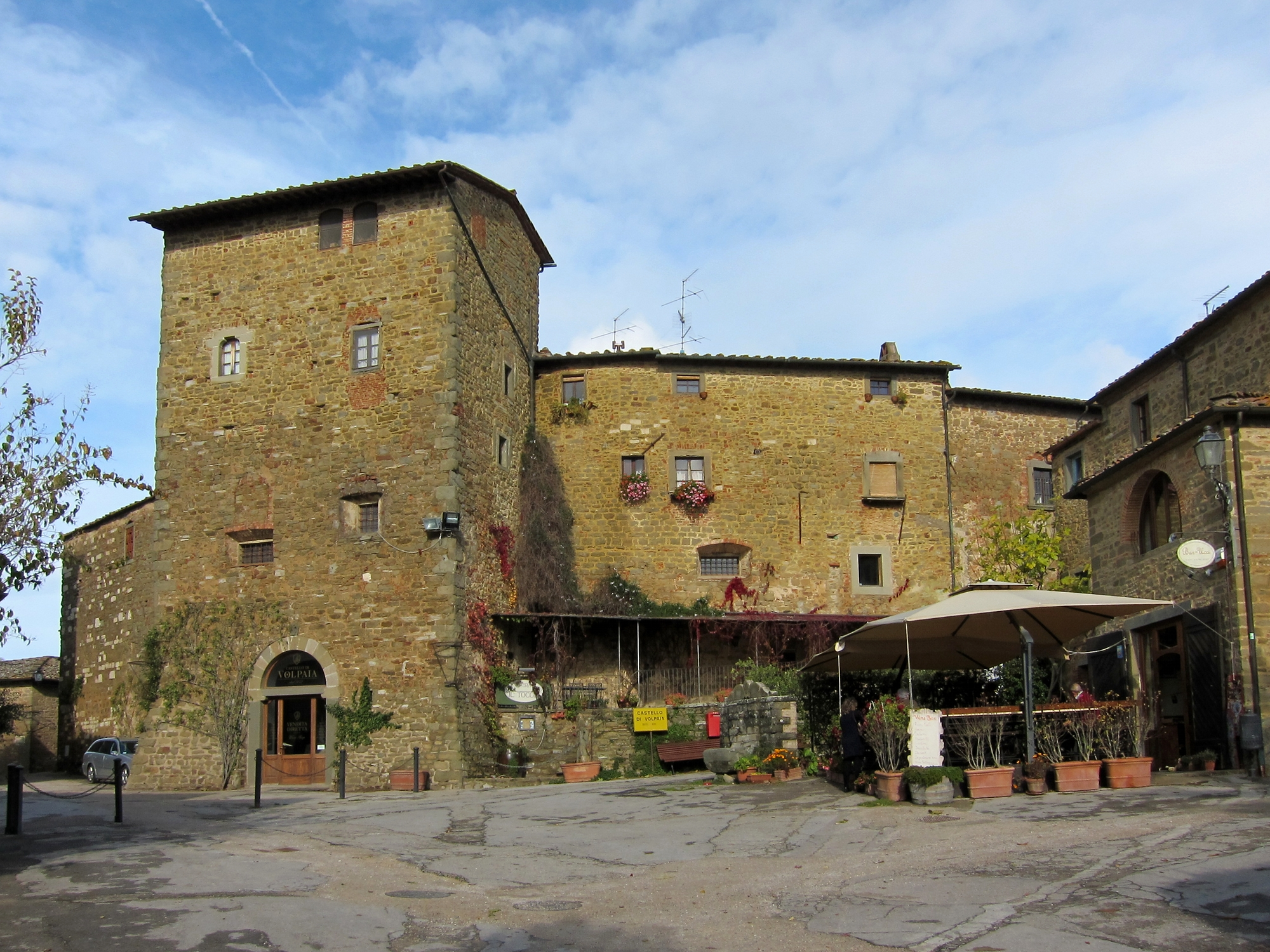 Le château de Volpaia dans la commune de Radda in Chianti.